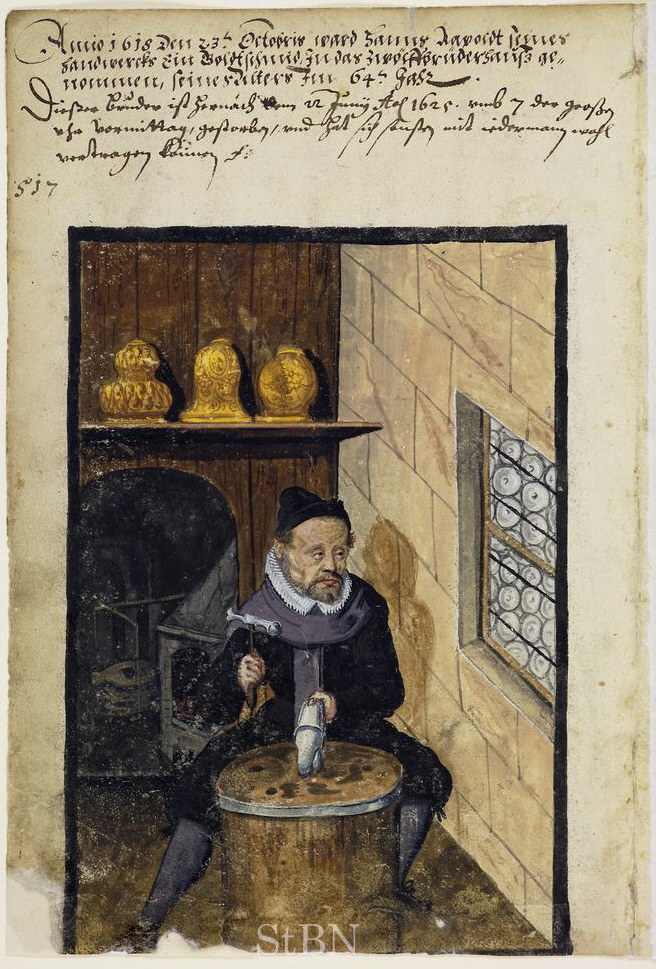 Hanns (Hans) Rapoldt (Rapold), Goldtschmid (Goldschmied) Transkription und weitere Informationen